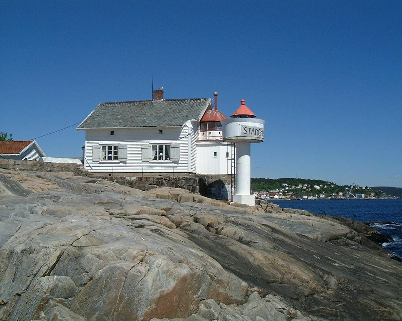 Stangholmen fyr